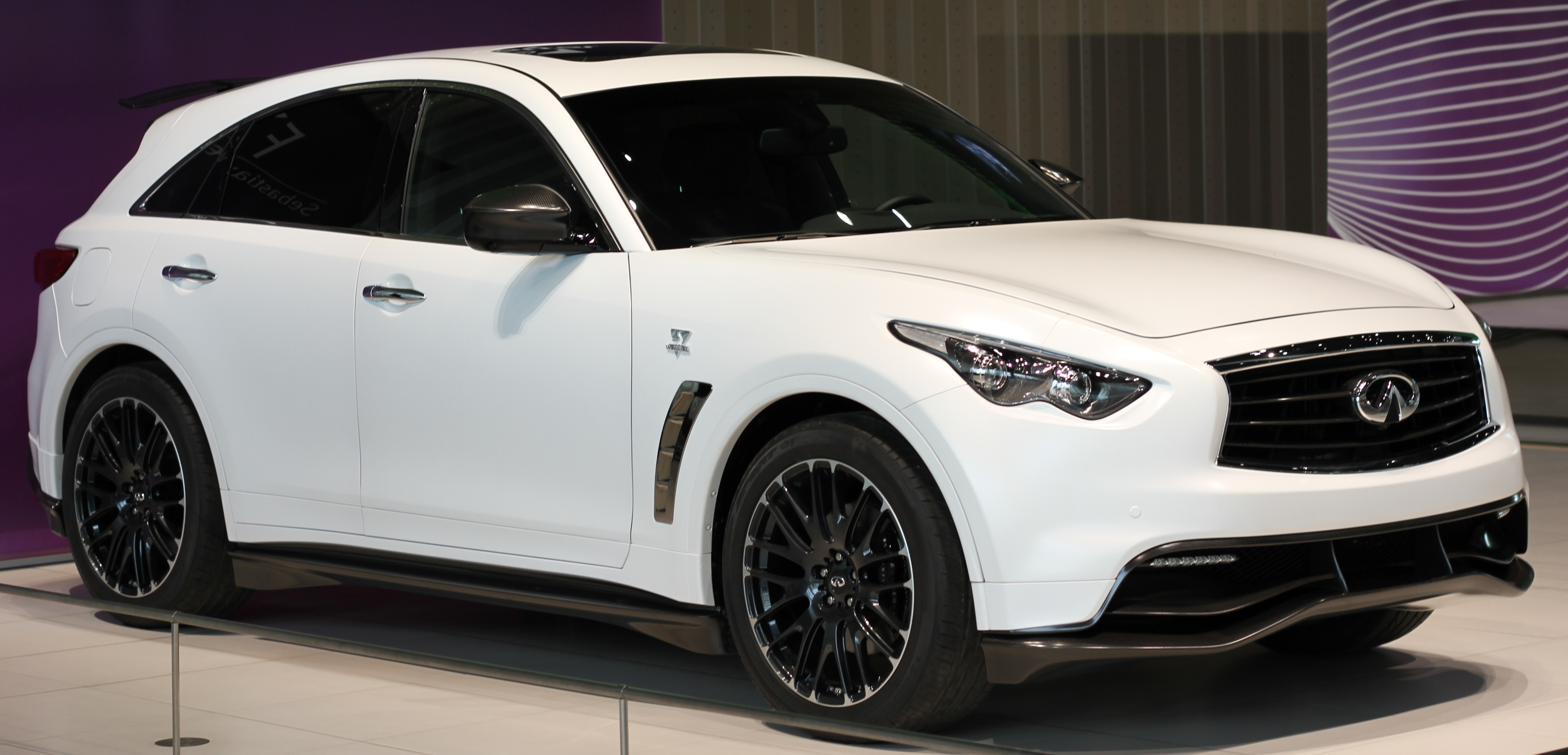 Infiniti FX